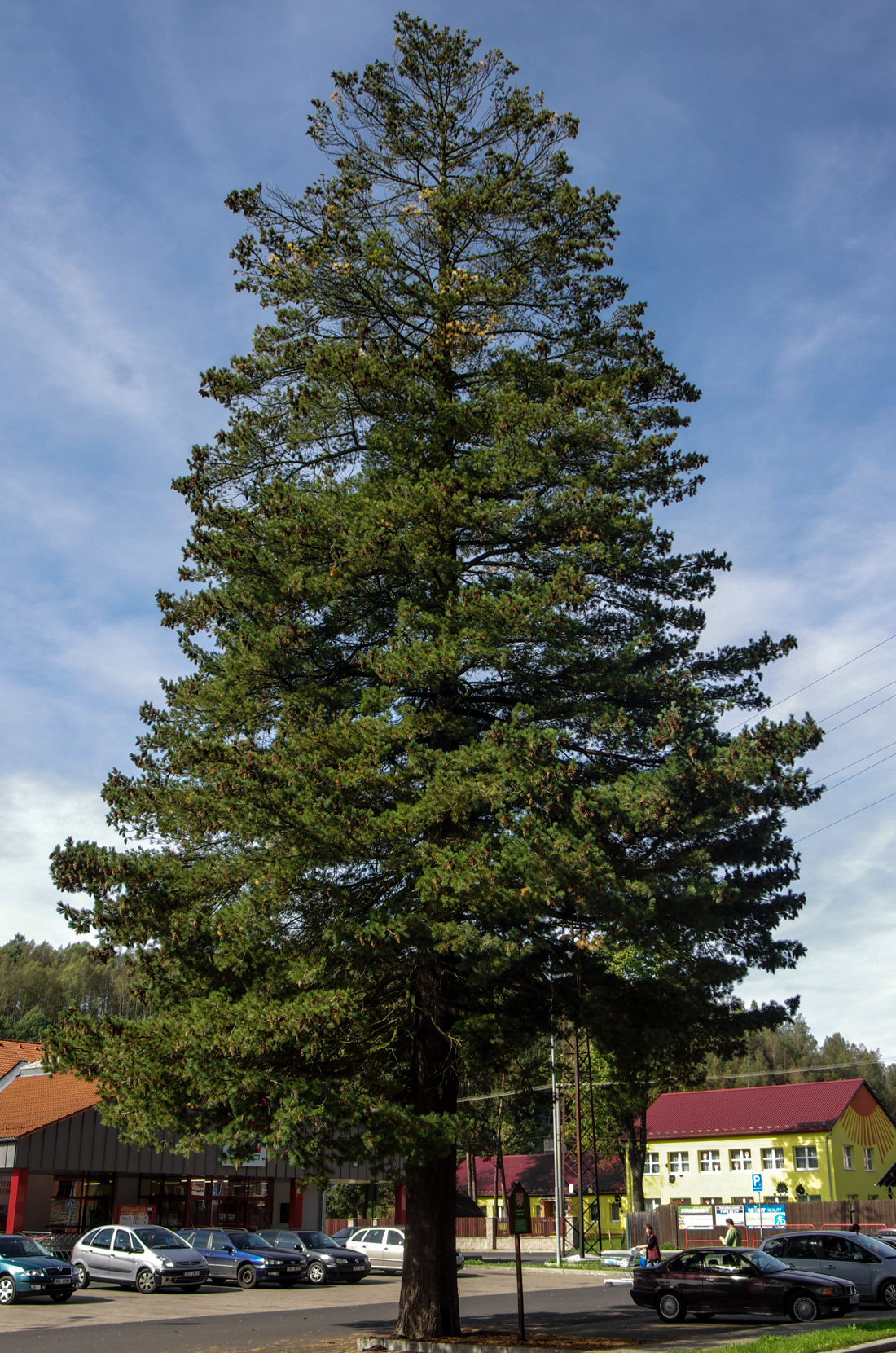 památný strom Borovice rumelská v Kraslicích, okres Sokolov